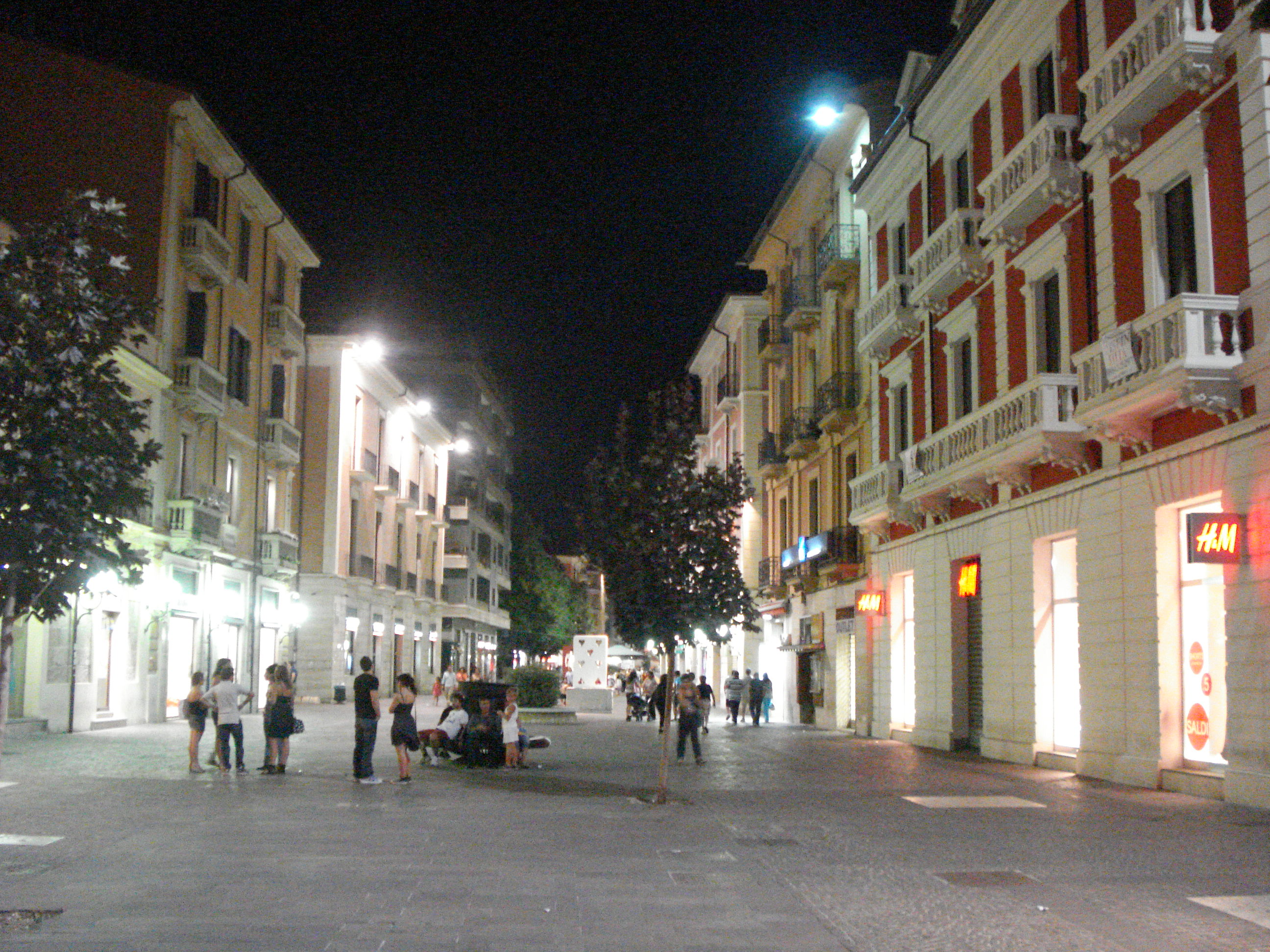 Tratto dell'isola pedonale di Corso Mazzini con museo all'aperto nel centro di Cosenza